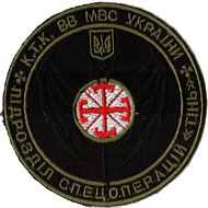 Нарукавна нашивка роти розвідки спеціального призначення Кримського територіального командування внутрішніх військ МВС України